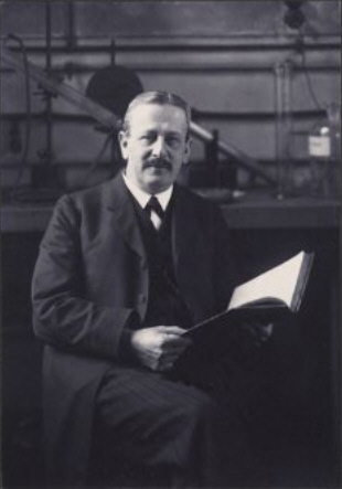 Siegmund Gabriel / Sigismund Gabriel (* 7. November 1851 in Berlin; † 22. März 1924 in Berlin)